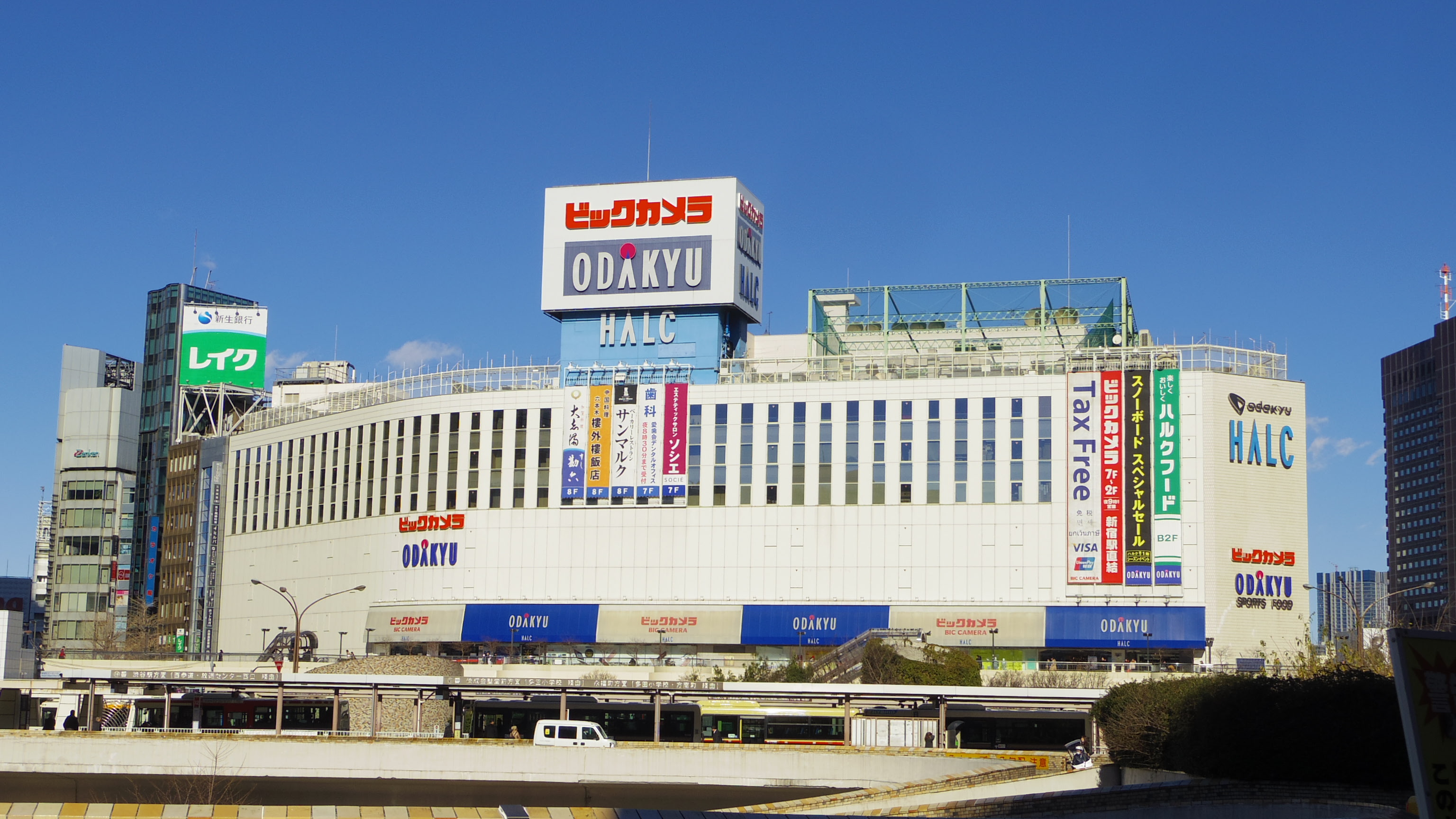 新宿駅西口、小田急百貨店新宿店別館「小田急ハルク」。ビックカメラ新宿店が入居する。